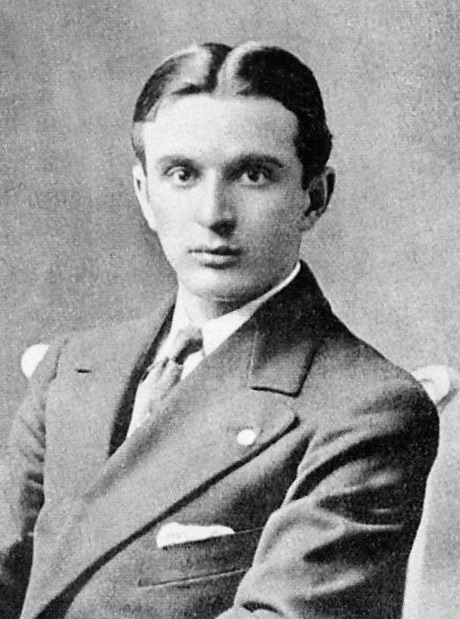 Juan Bielovucic (1889-1949). Aviador peruano, el primero que realizó vuelos en el Perú y Sudamérica. Se enroló en la aviación francesa durante la primera guerra mundial.